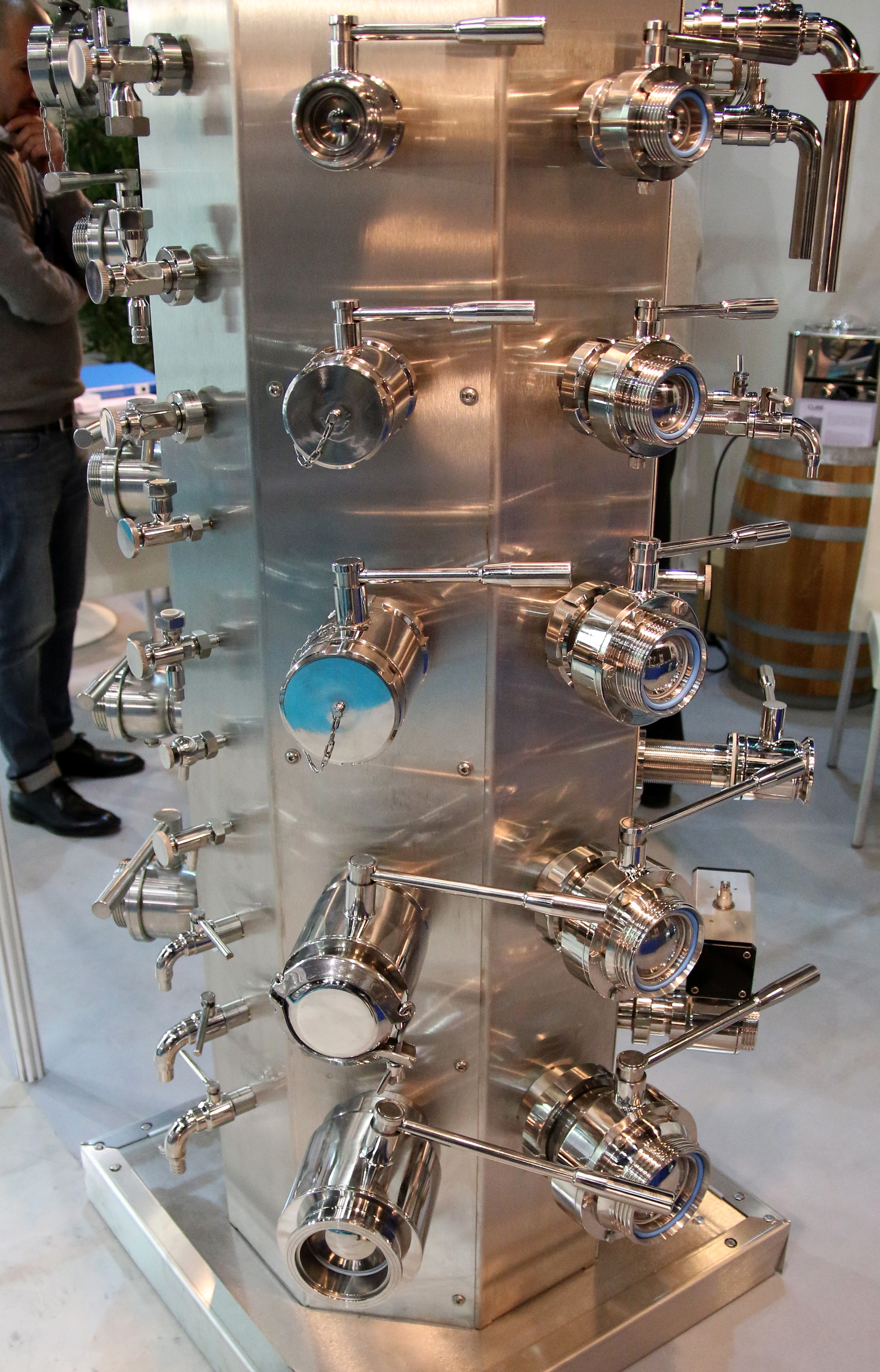 Différents types de vannes et robinets